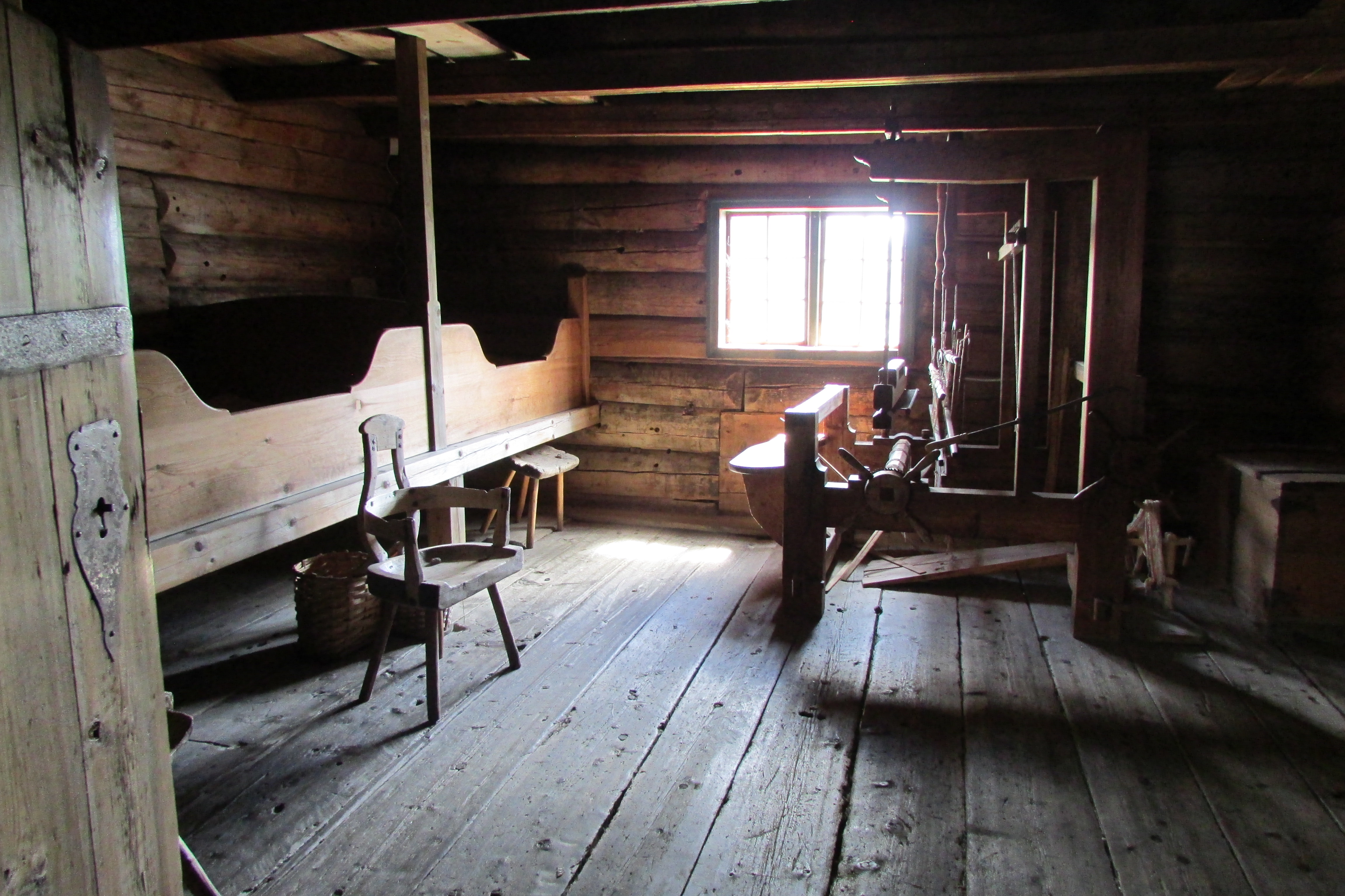 Mølstertunet